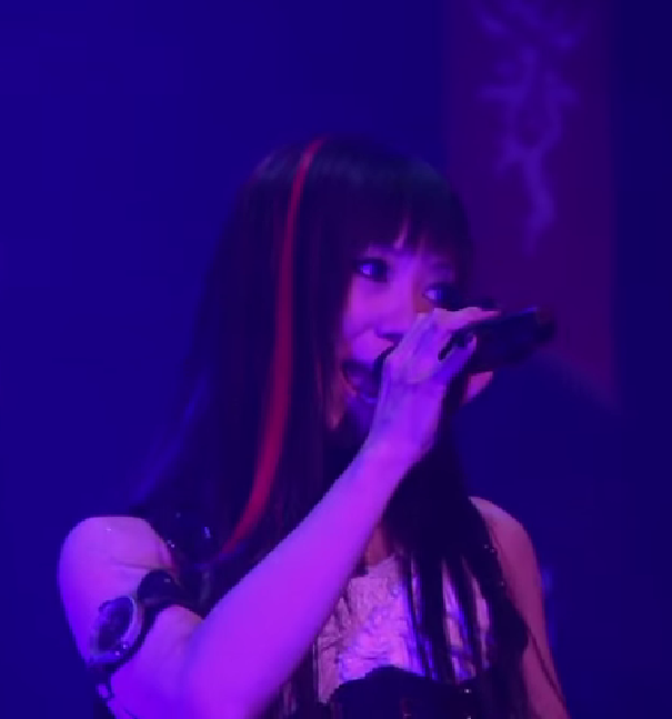 Yui Itsuki. Concierto "Yousei Teikoku: Live Pax Vesania Tour"